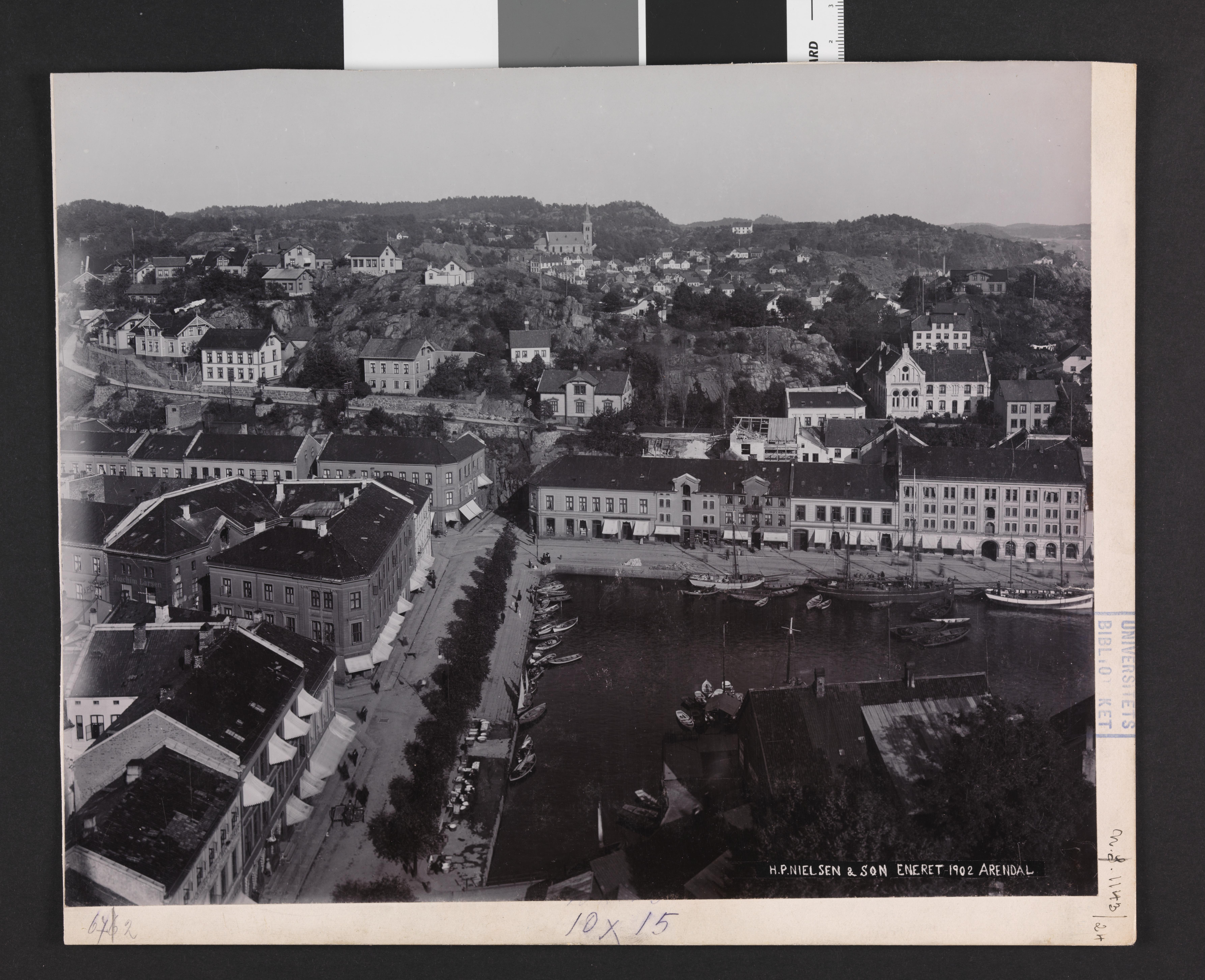 Bildet er hentet fra Nasjonalbibliotekets bildesamling Arendal, Aust Agder